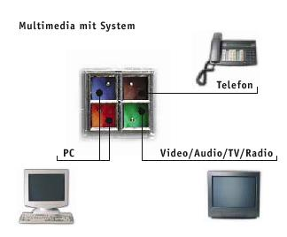 EC 7 Mulitmedia